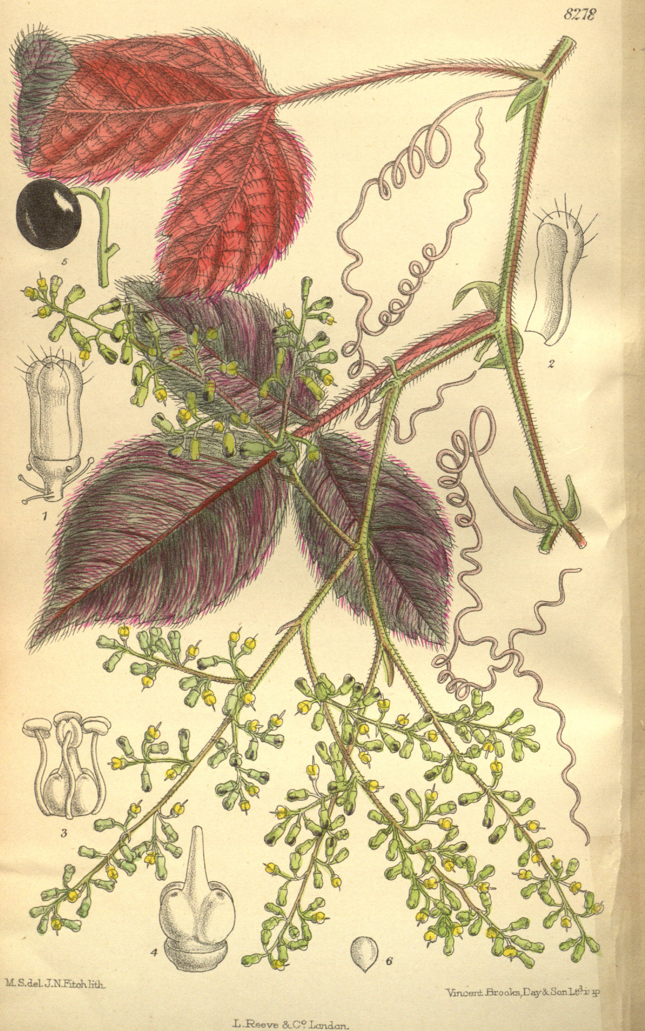 Cissus adenopodus (= Cyphostemma adenopodum), Vitaceae